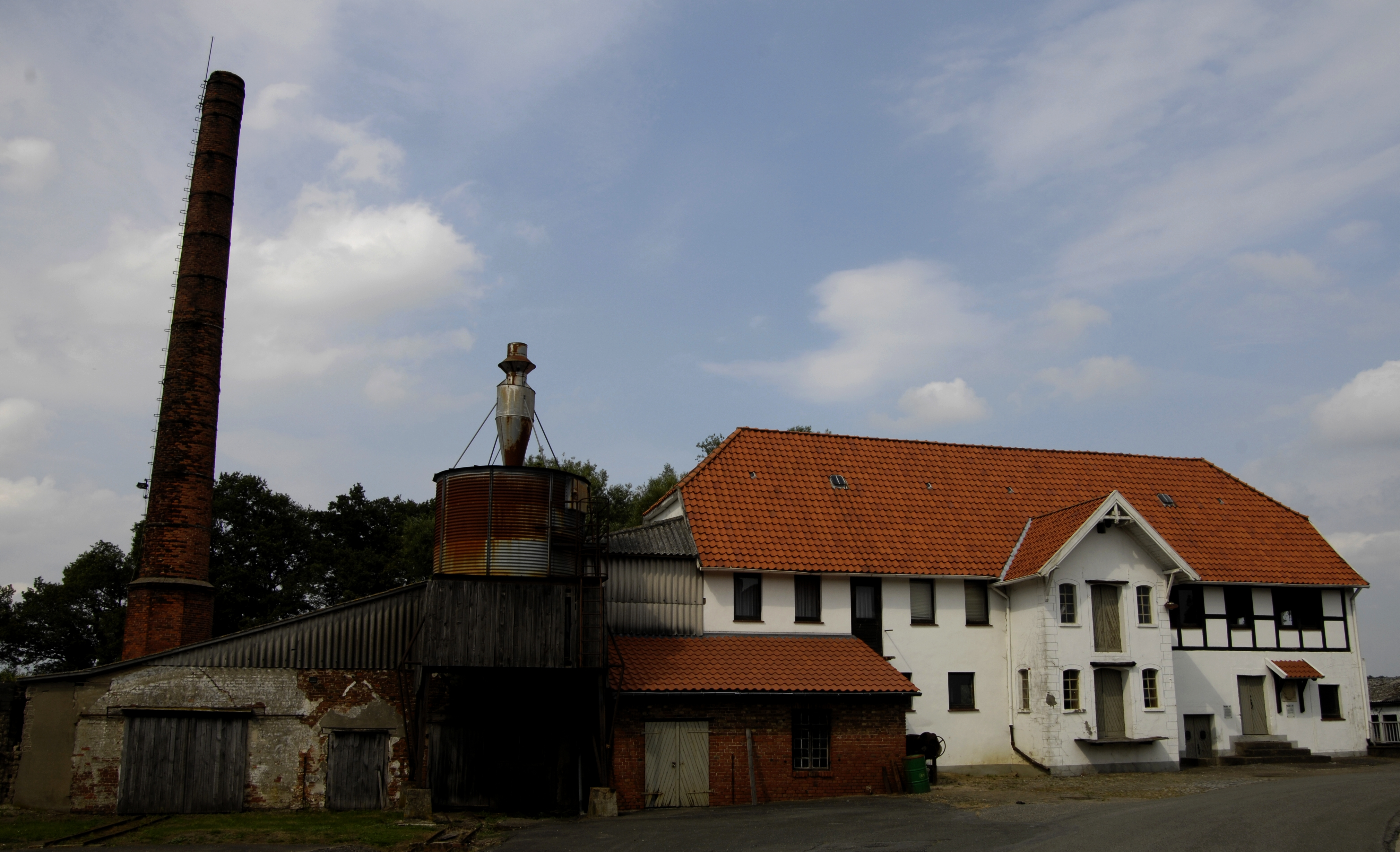 Ehemalige Oelmühle an der Hunte in Hunteburg